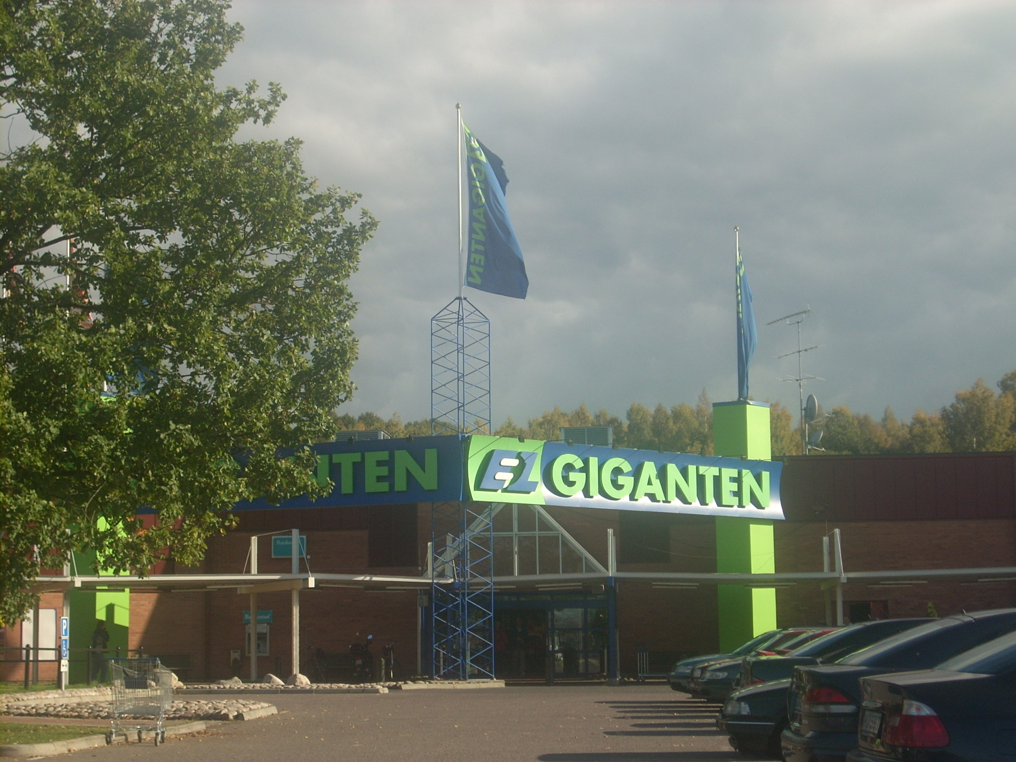 ElGiganten i Jönköping